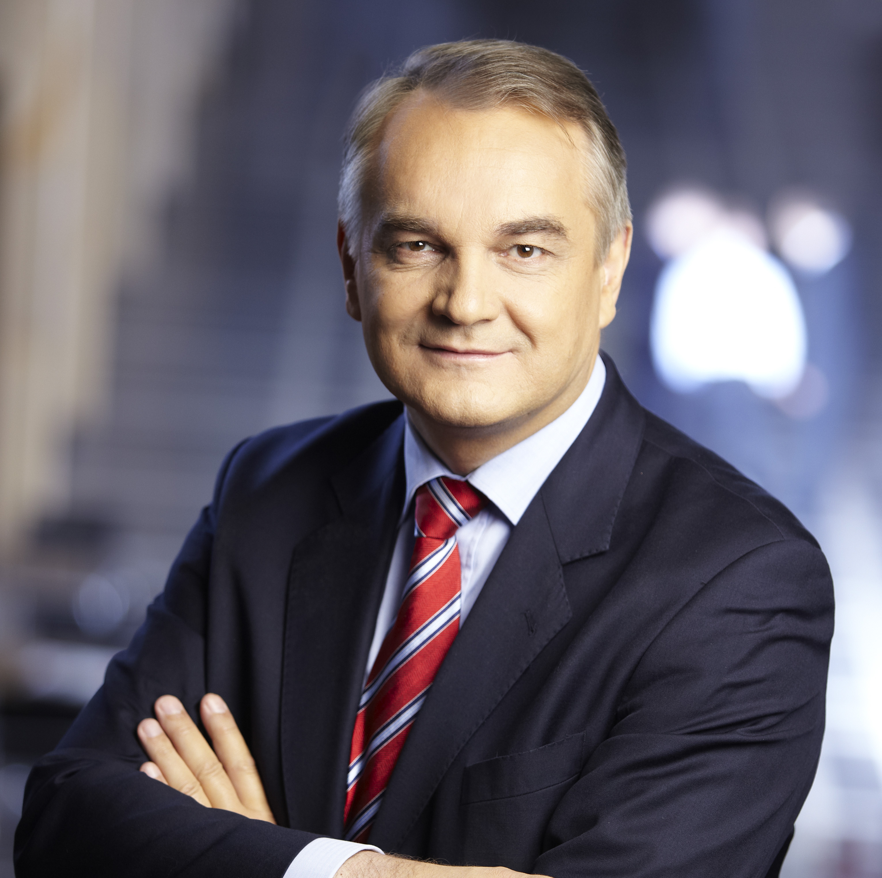 Zdjęcie Waldemara Pawlaka na potrzeby kampanii prezydenckiej 2010